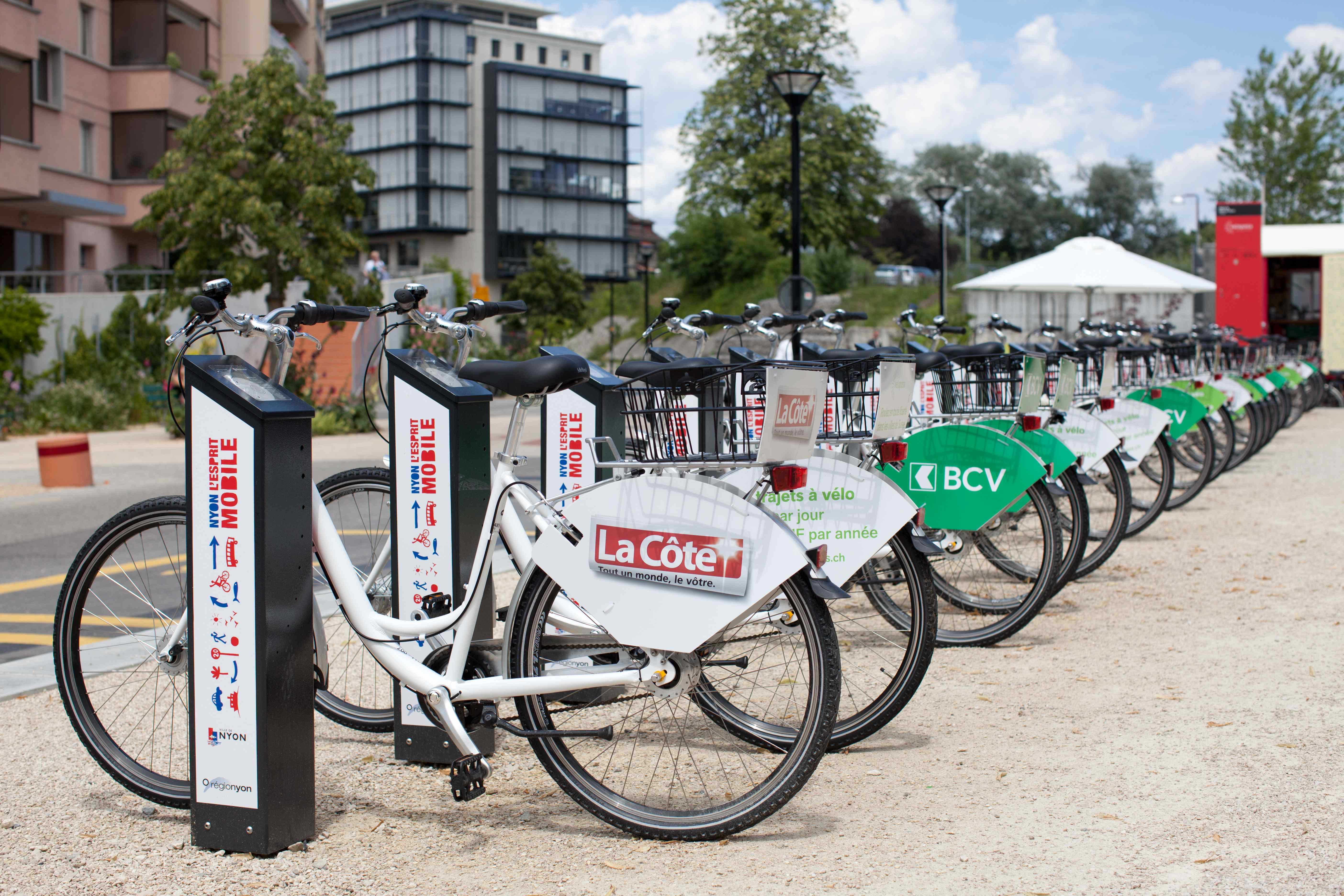 station Gare de Nyon